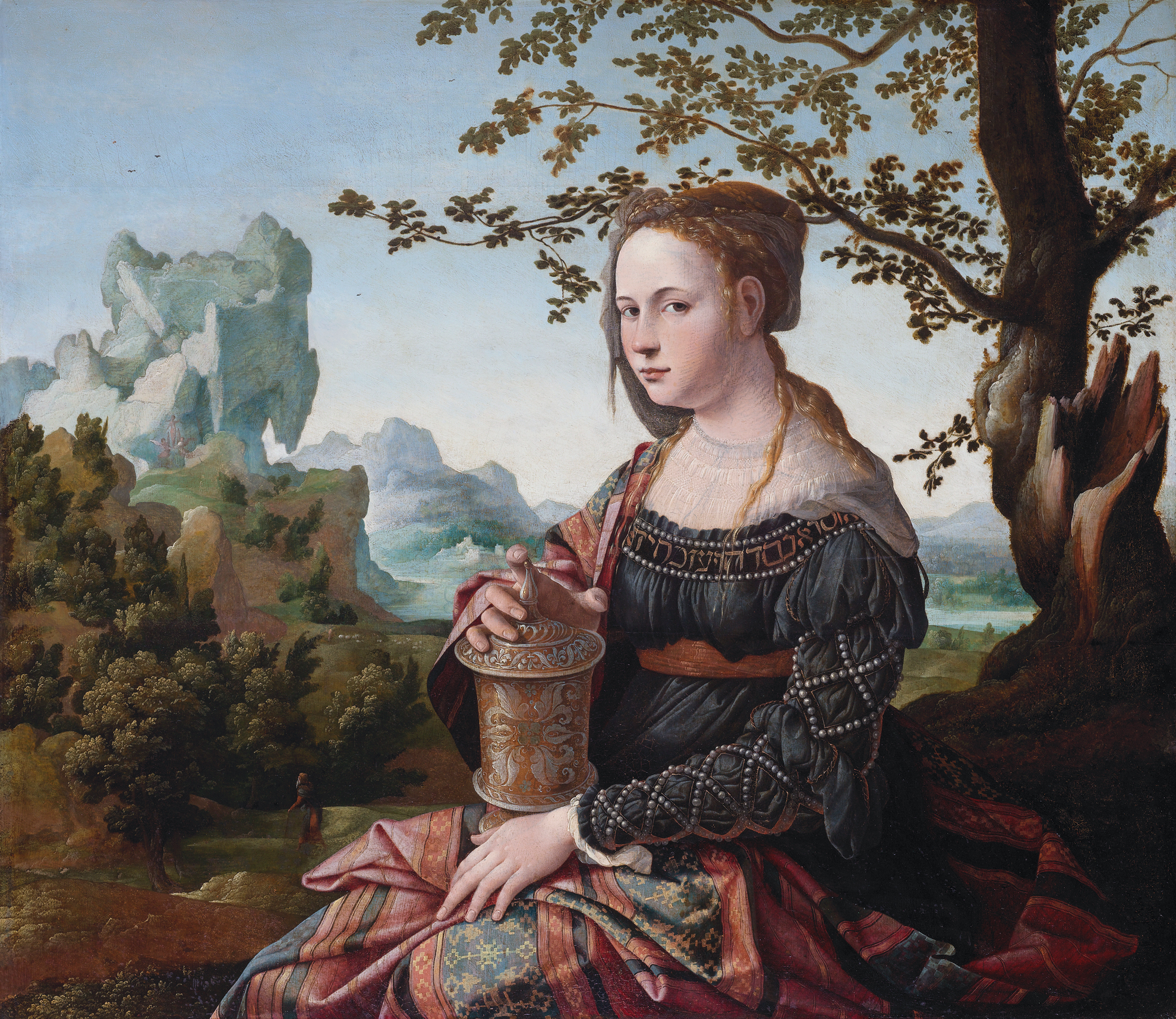 Tradition der niederländischen Romanisten.